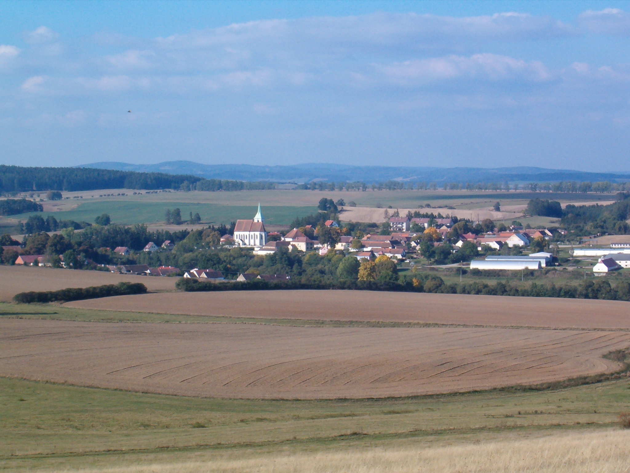 Pohled na Cizkrajov od Montserratu